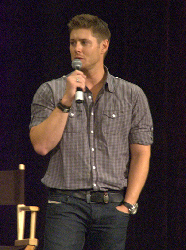 jensen025